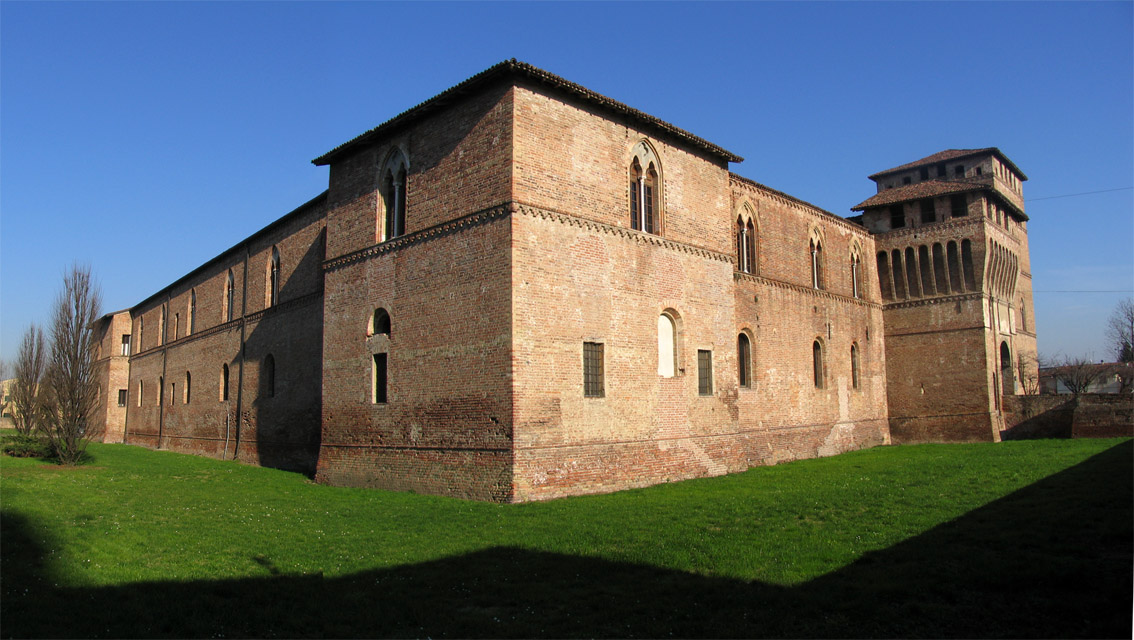 Castello Vesconteo - Pandino 01/2007